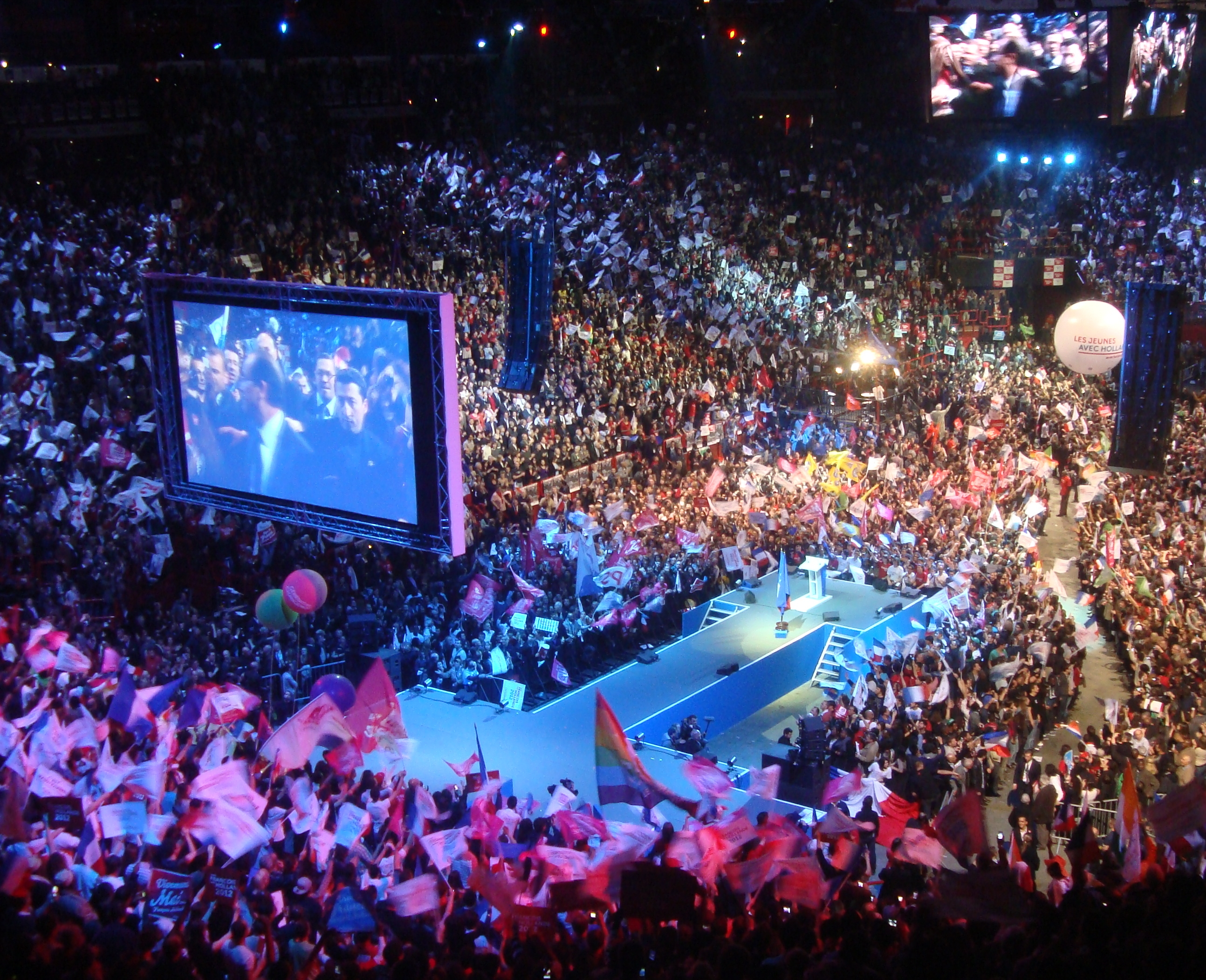 Meeting de François Hollande le 29 avril 2012 au Palais Omnisports de Paris-Bercy. La scène avant l'entrée de François Hollande.